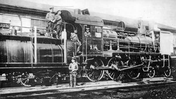 Паровоз типа 2-3-0 серии Уу-14